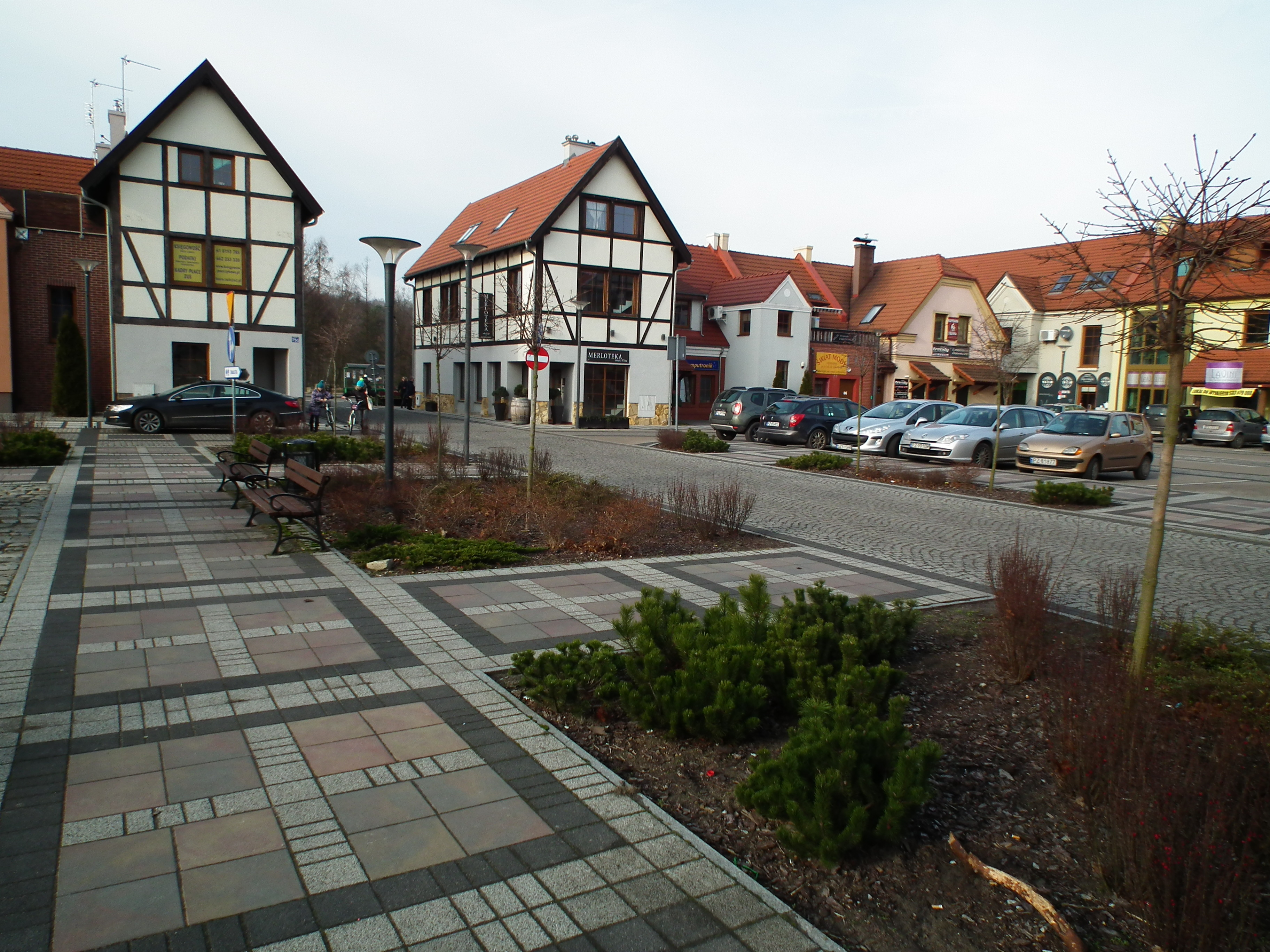 Rynek w Puszczykowie.